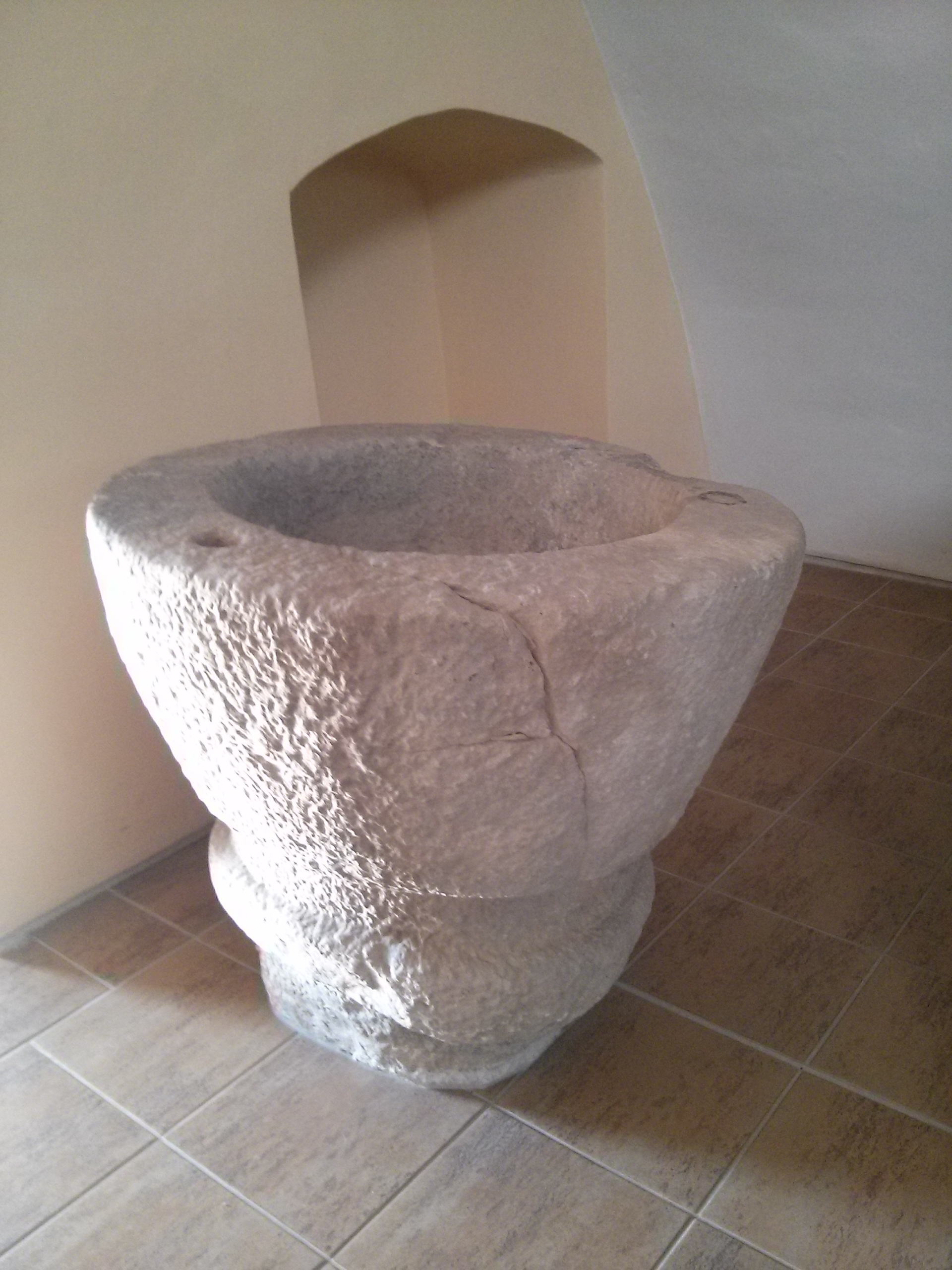 Pískovcová křtitelnice v kostele sv. Petra z Alcantary v Karviné-Dolech (asi z 15. stol.)